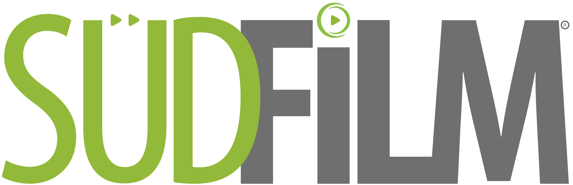 Südfilm Logo